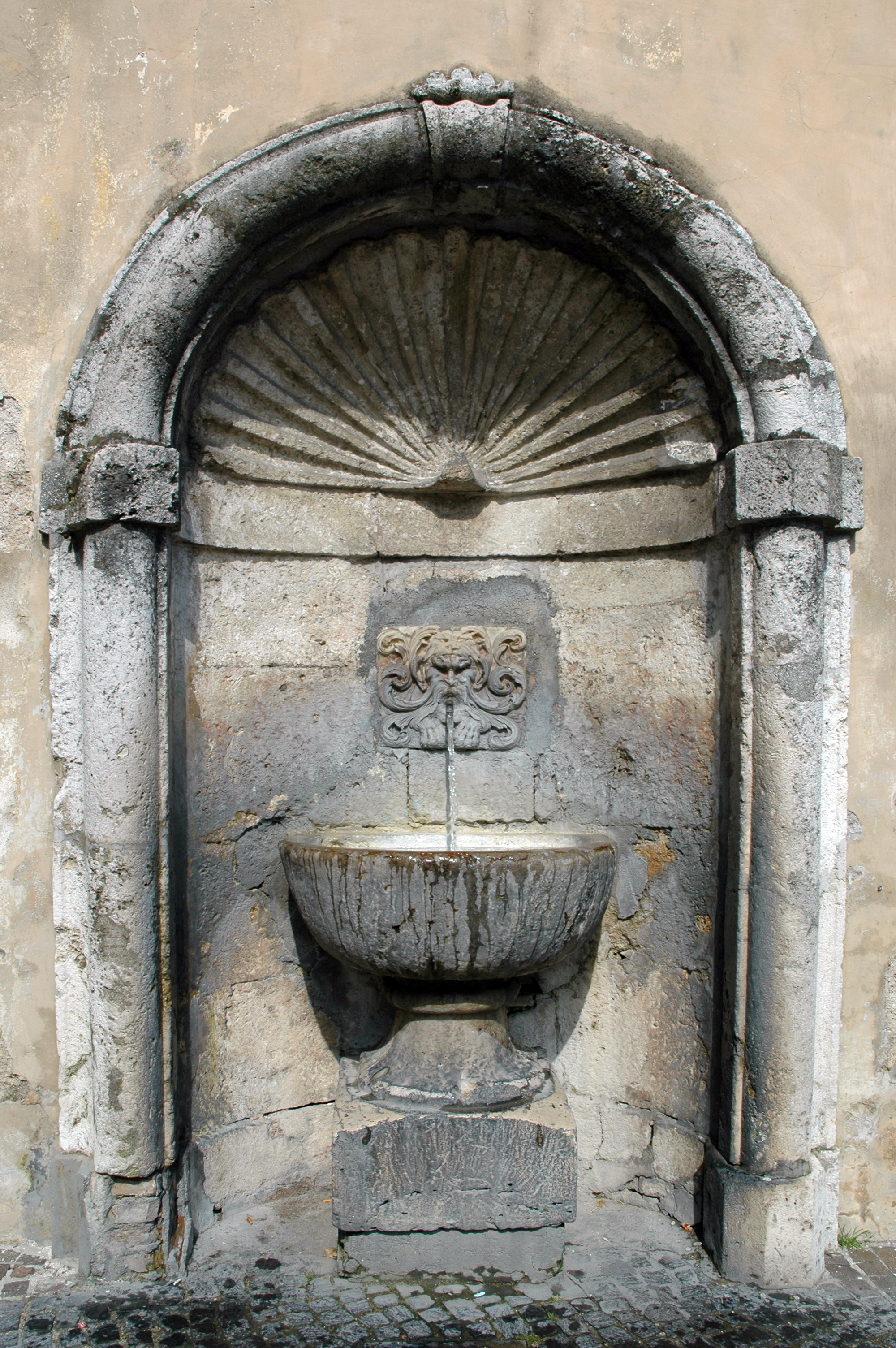 Fontanella di piazza della Libertà Si trova in quello che era il cortile della famiglia Ancajani, poi divenuto piazza con l'apertura della traversa nazionale interna, addossata alle distrutte scuderie, che giacevano sopra il Teatro Romano. Qui l'acqua sgorga dalla bocca di una sorta di satiro, protetto da una volta a forma di conchiglia.